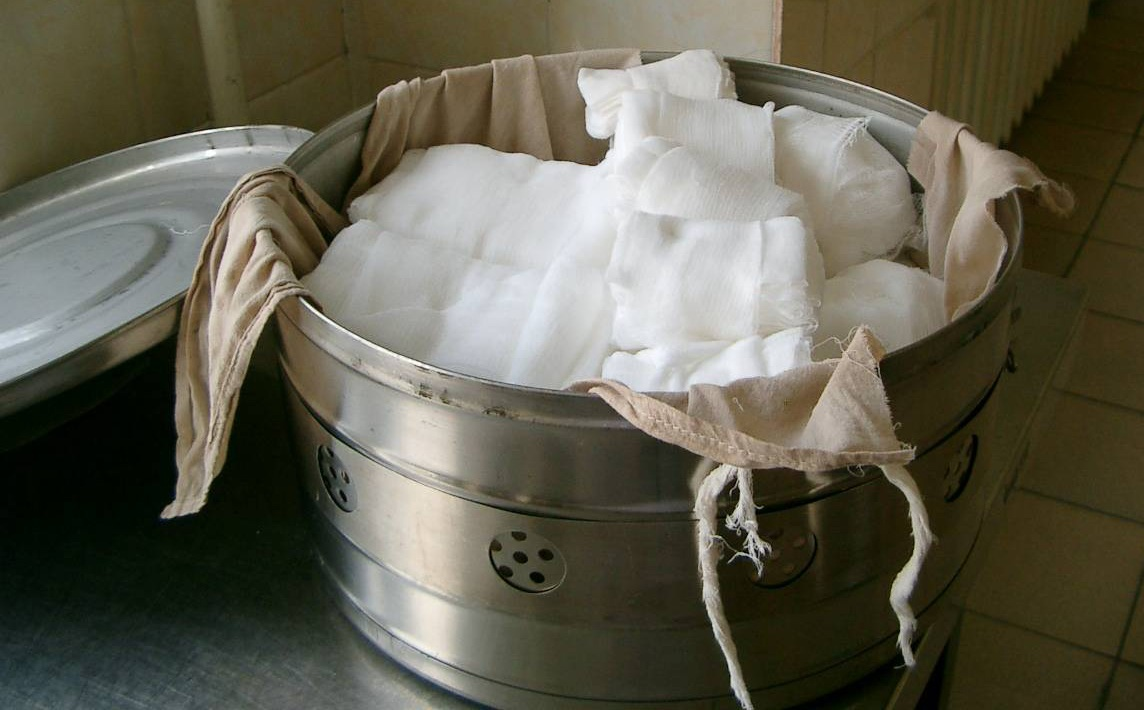 на изображении виден бикс